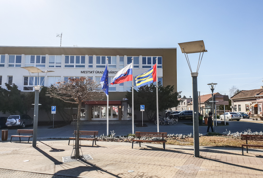 Town_Hall_of_Sturovo-Párkánylabel QS:Len,"Town_Hall_of_Sturovo-Párkány"label QS:Lhu,"A párkányi városháza (hivatalos nevén Mestsky Urad/Városi Hivatal)"